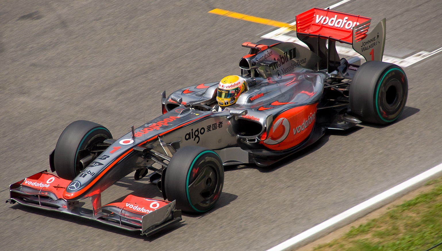 Nikon D90 + Sigma 18-200 DC OS HSM 1/1600s - F/9 - 200mm - ISO640